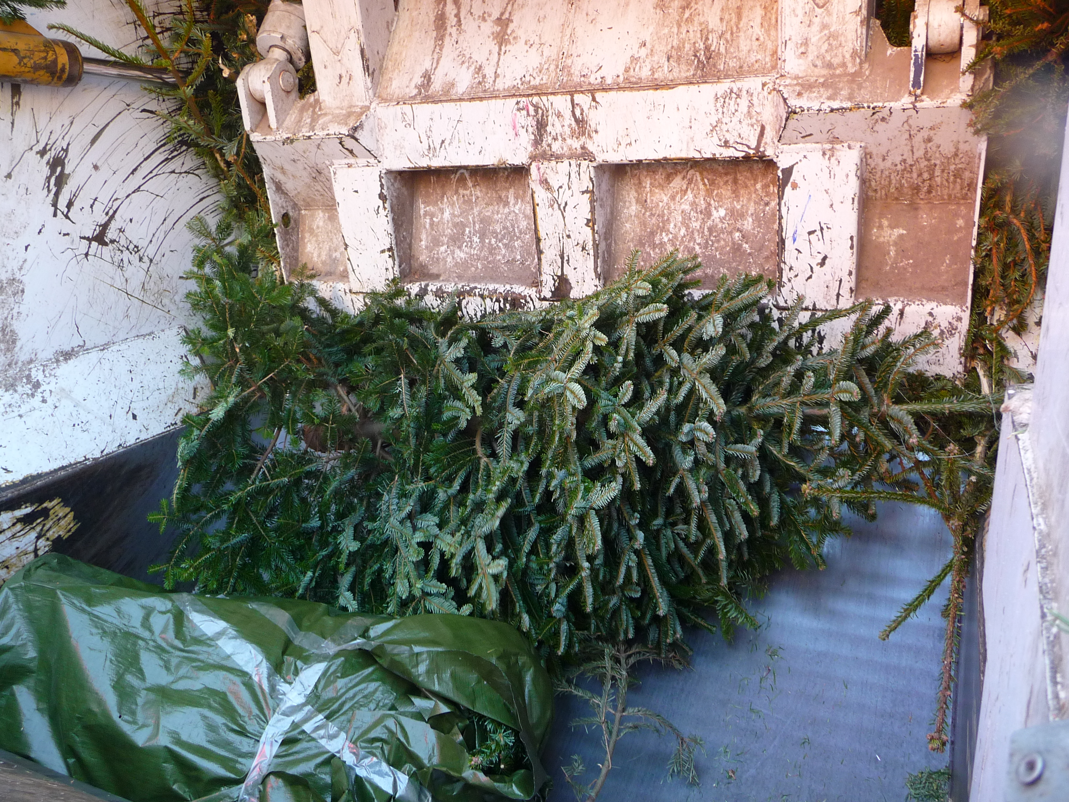 Entsorgung von Weihnachtsbäumen mit einem GPM Hecklader von Geesink